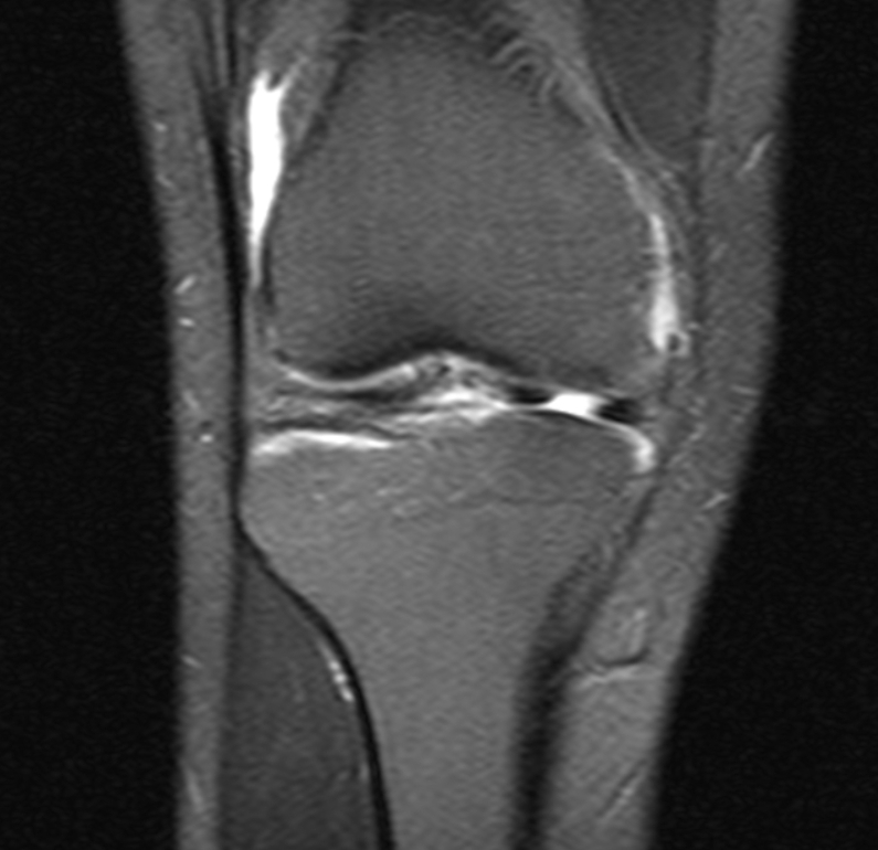 MRI image - knee with meniscus tear